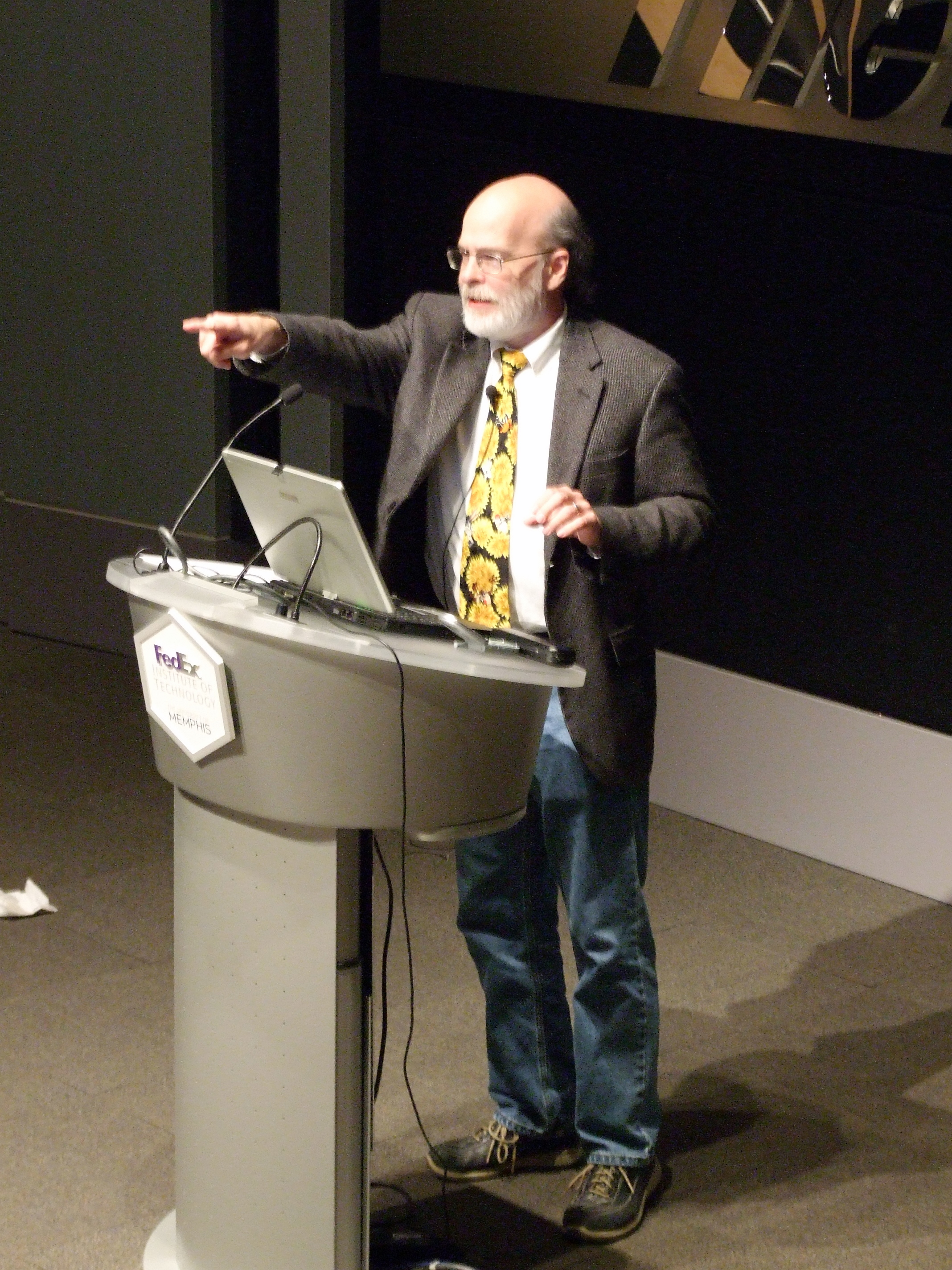 Чарльз Петцольд на конференции "Day of Dot Net" в Мемфисе, 10 ноября 2007 года